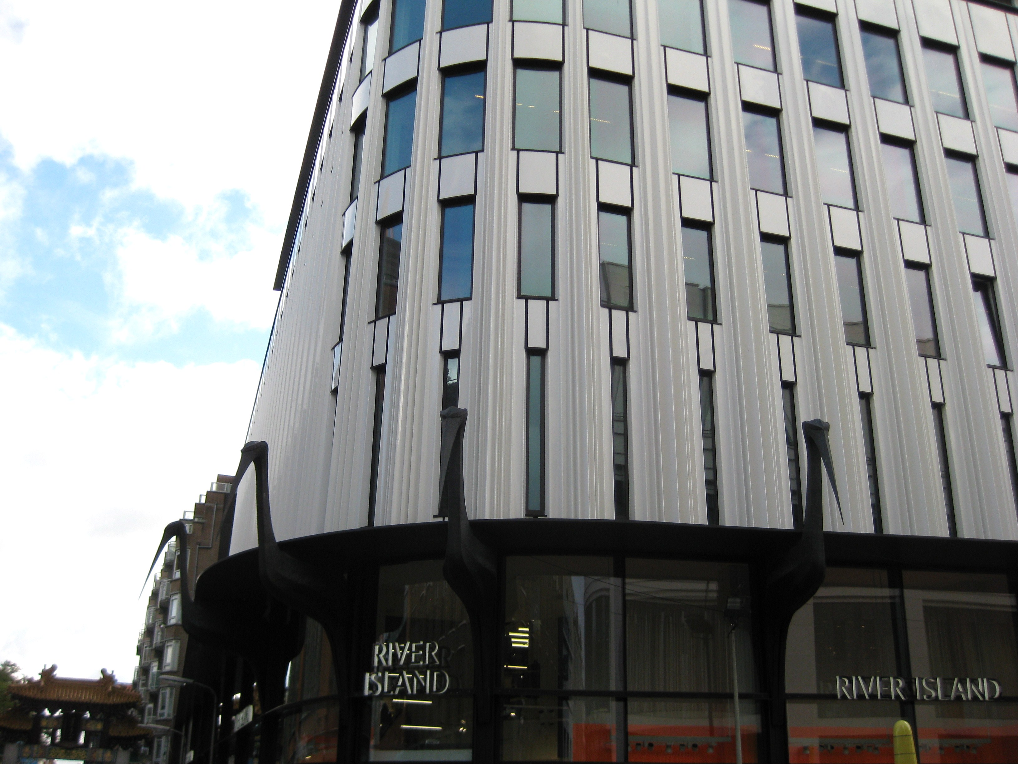 Sythoff City, Grote Marktstraat, Den Haag op de plaats van het voormalige Haagsche Courantgebouw met een versiering van ooievaars